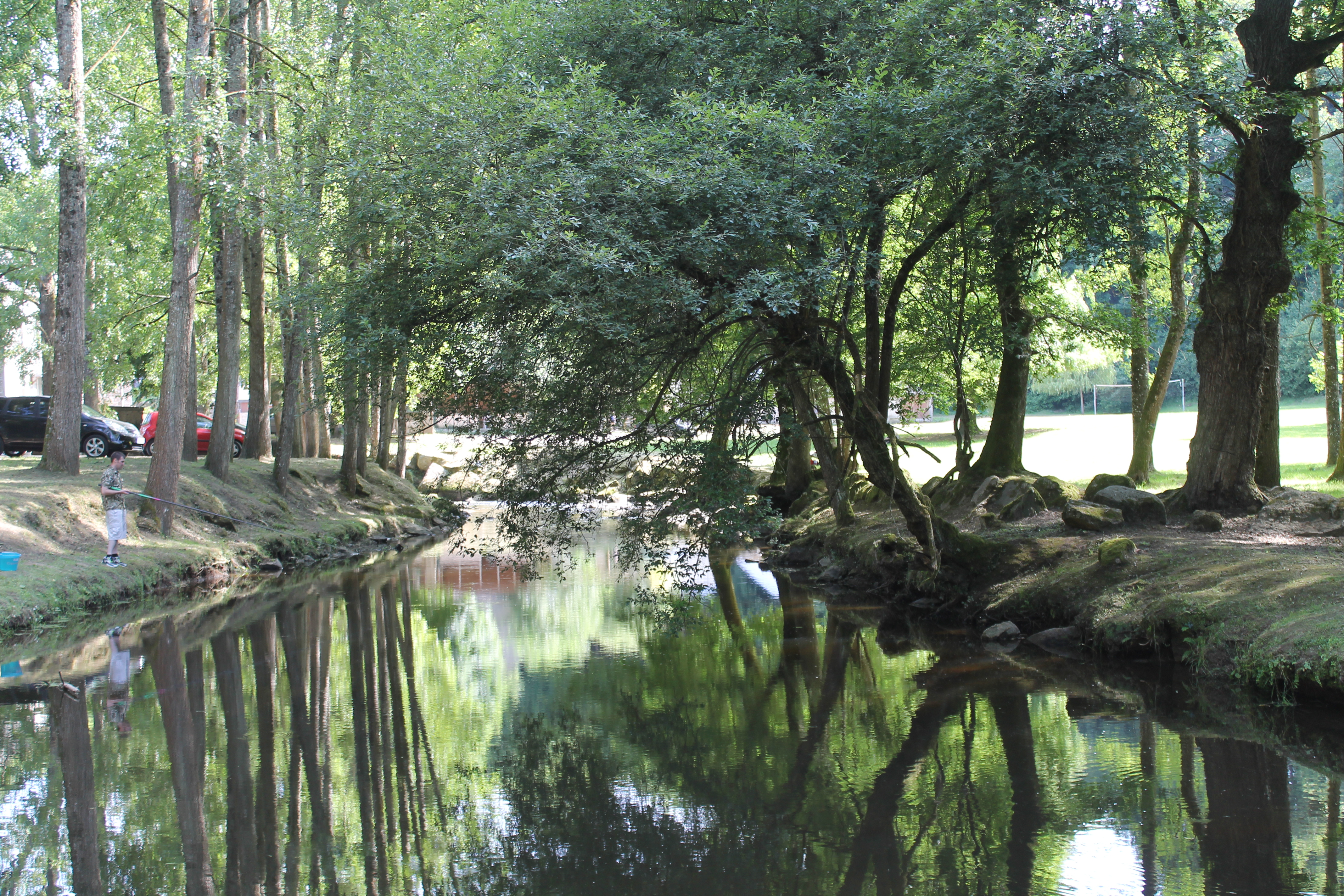 Le Gouët - Sainte-Anne-du-Houlin